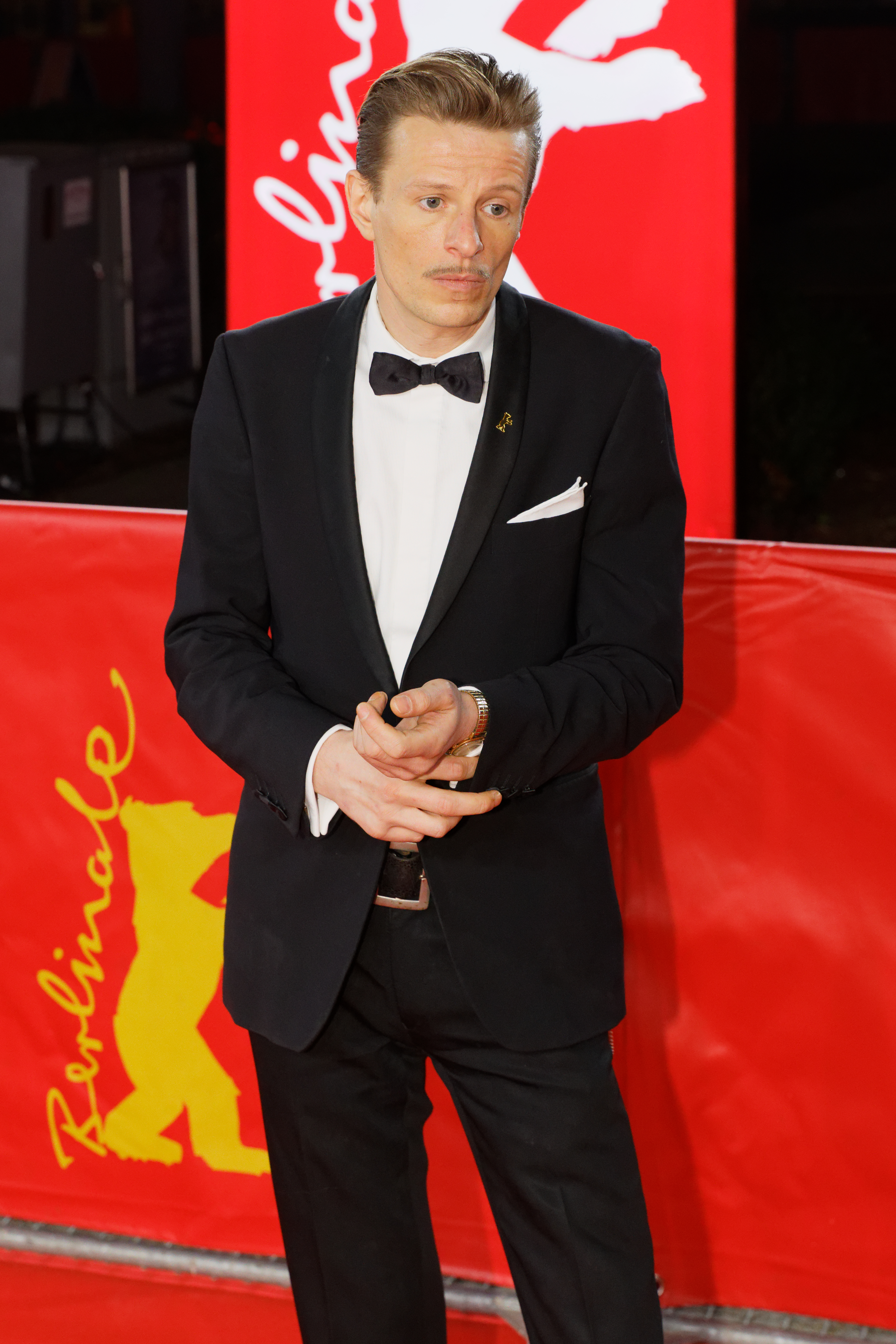 Alexander Scheer bei der Weltpremiere von Der junge Karl Marx bei der Berlinale 2017